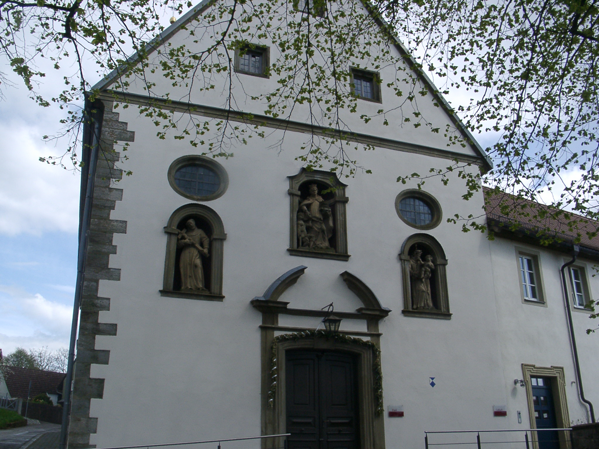 Schillingsfürst, Kath. Kirche